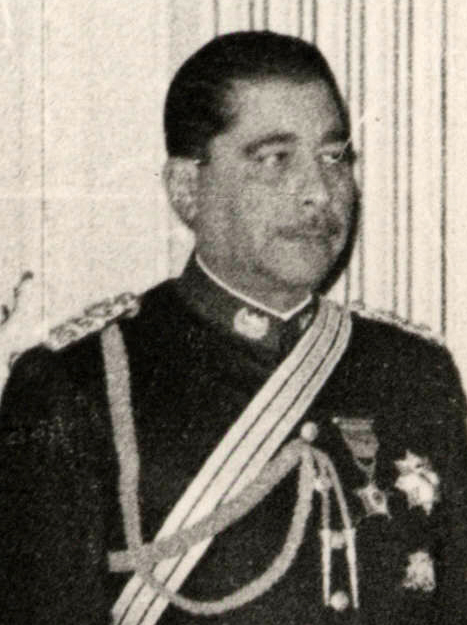 Sergio Víctor Arellano Stark (Santiago, 10 de junio de 1921) fue un militar chileno. Famoso por el Caso Caravana de la Muerte.